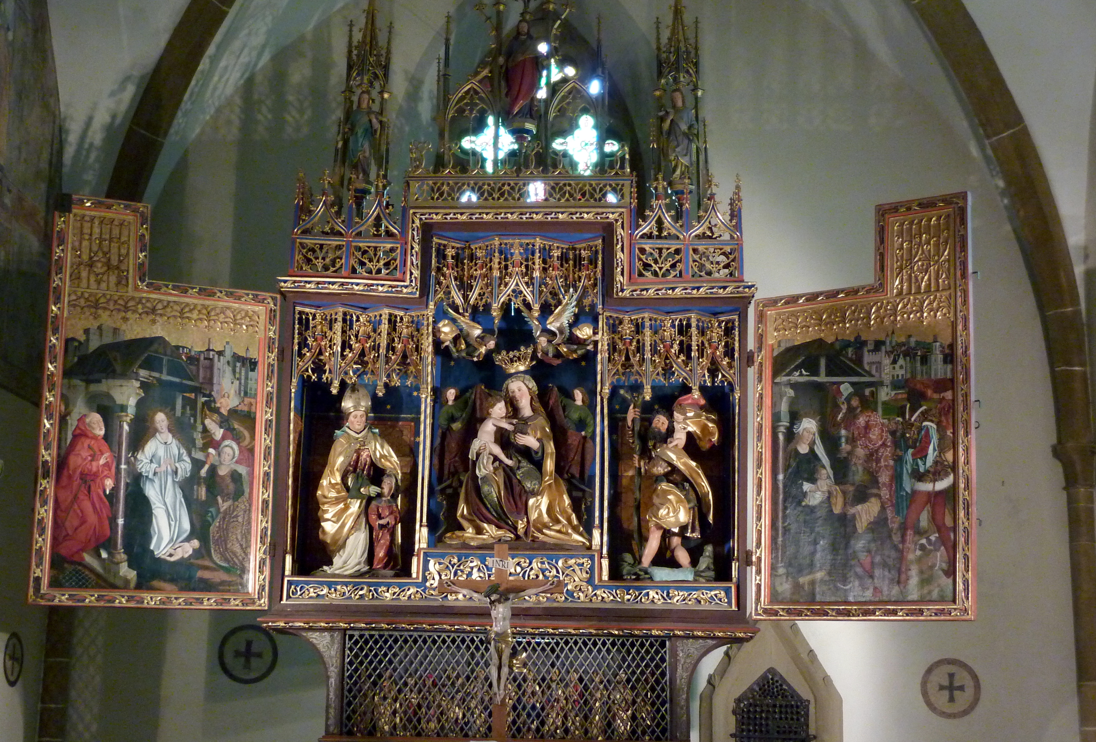 Evangelische Stadtkirche St. Blasius in Bopfingen, einer Stadt im Ostalbkreis (Baden-Württemberg), Flügelaltar von Friedrich Herlin, von 1472